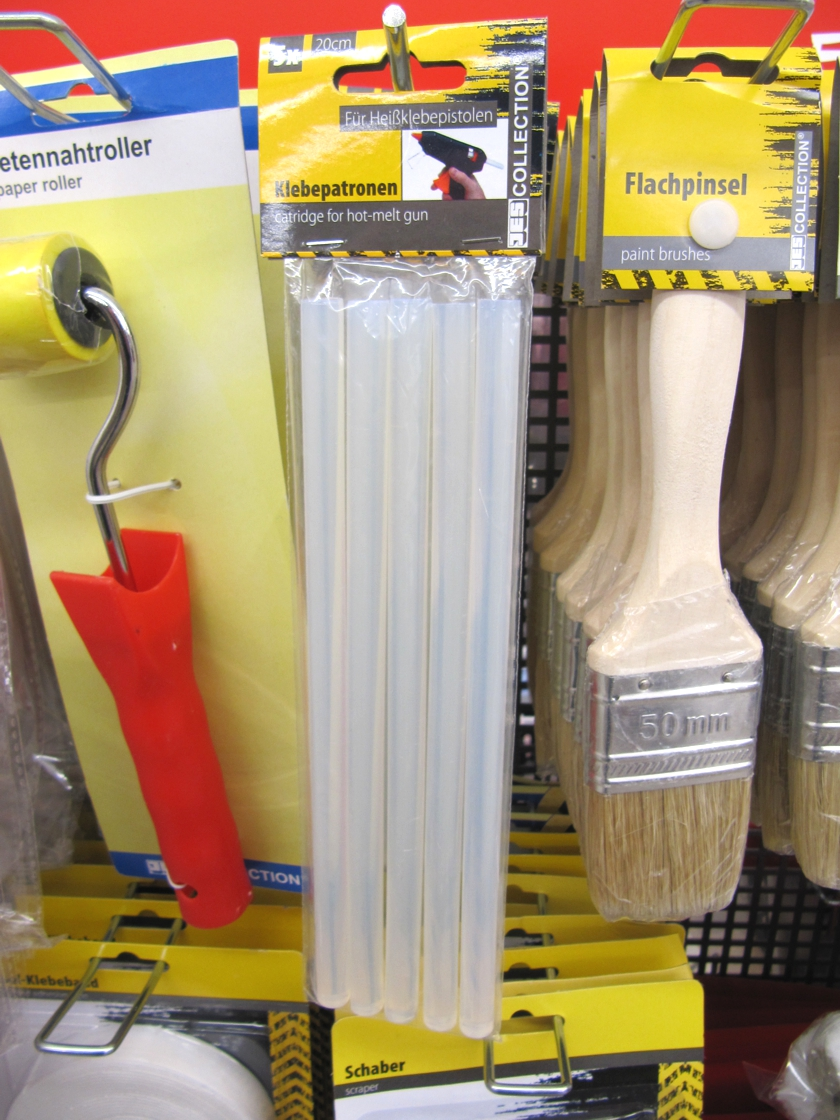 Ersatzpatronen für Heißklebepistole